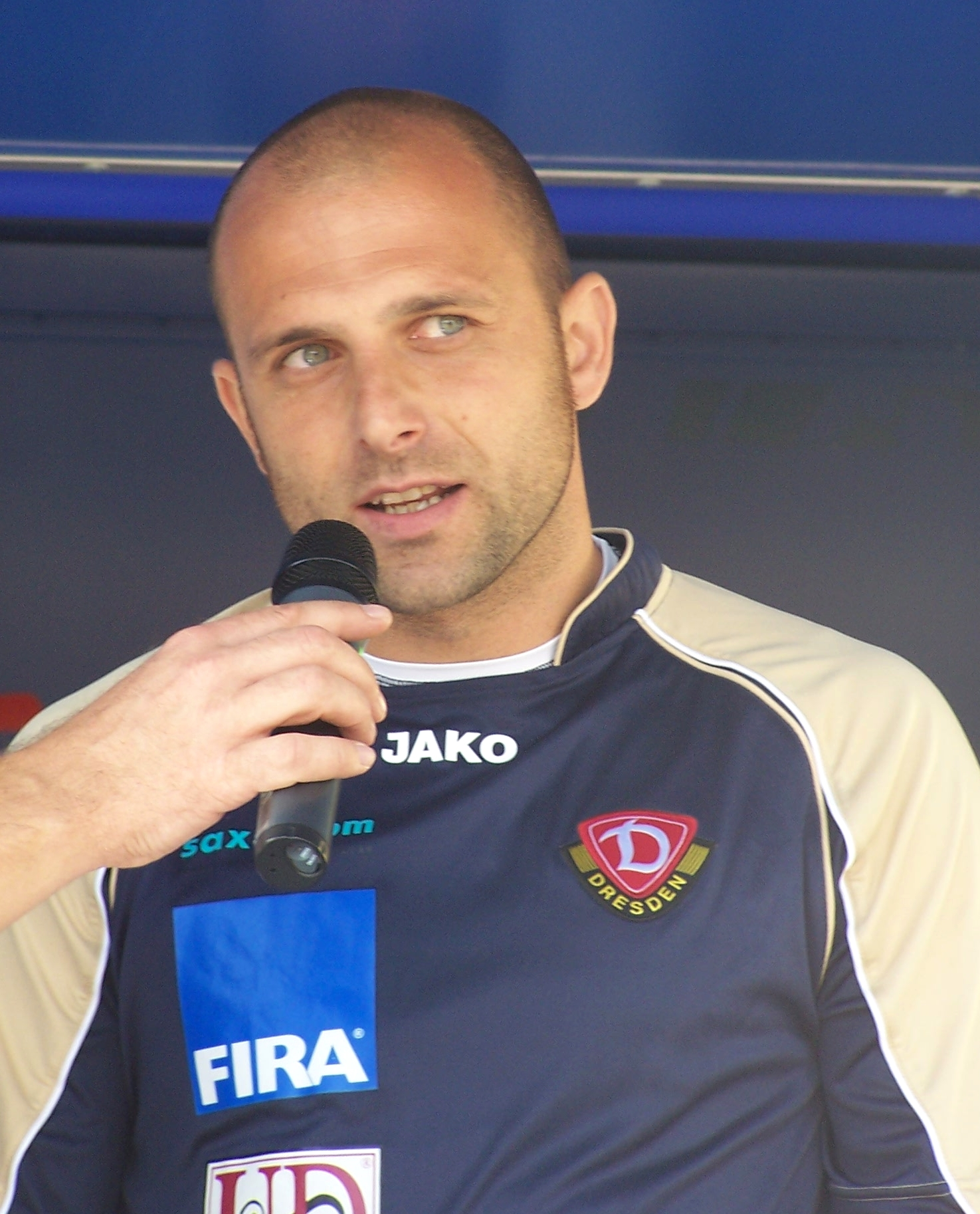 Torwarttrainer Gunnar Grundmann bei der Teampräsentation von Dynamo Dresden zum Start der Drittliga-Saison 2008/09